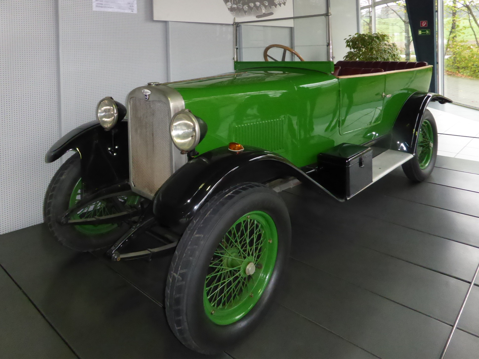 Wanderer 5/20 (W 8) im EFA-Museum für Deutsche Automobilgeschichte in Amerang.